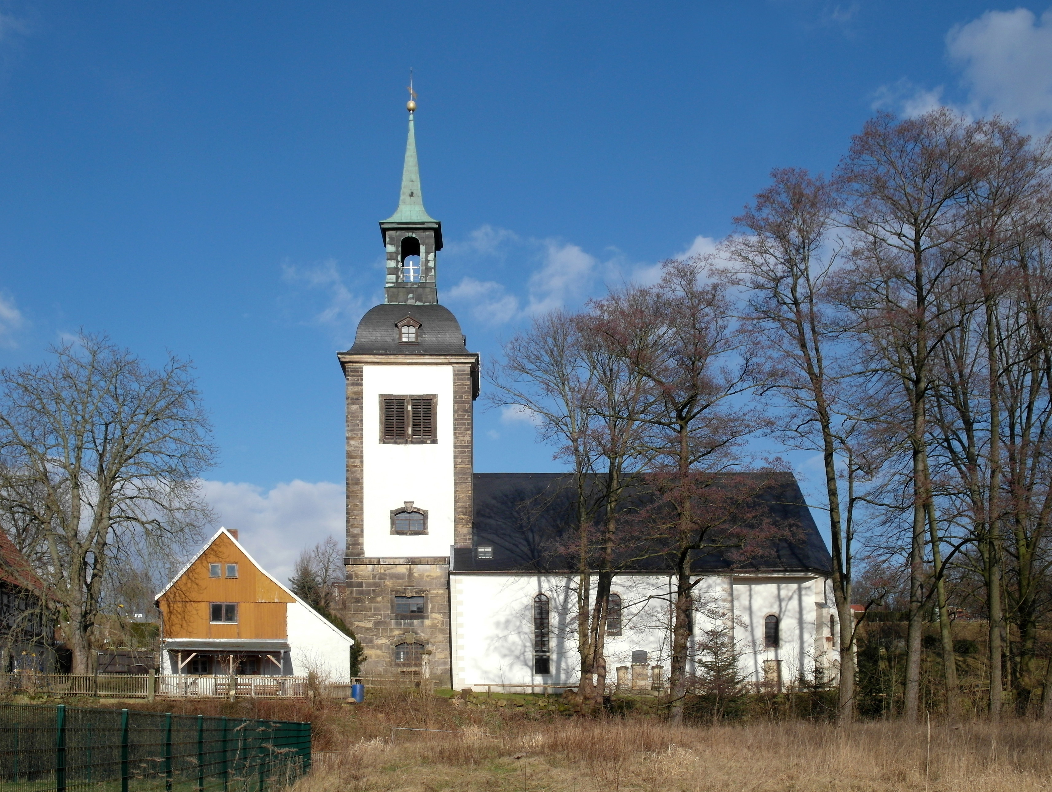 13.02.2018 01833 Dittersbach (Dürrröhrsdorf-Dittersbach), Hauptstraße 111: Evangelische Kirche (GMP: 51.036563,13.988027) mit dem Pfarrhaus. Nach dem Brand von 1660 wurde die 1662 heutige Kirche errichtet. Der Kirchturm wurde erst 1722 fertig. Innen eine Orgel von Gottfried Silbermann aus dem Jahre 1726. Sicht von Süden. [SAM3990.JPG]20180313310DR.JPG(c)Blobelt